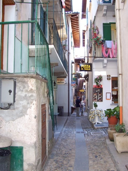 Vicolo sull'Isola dei Pescatori